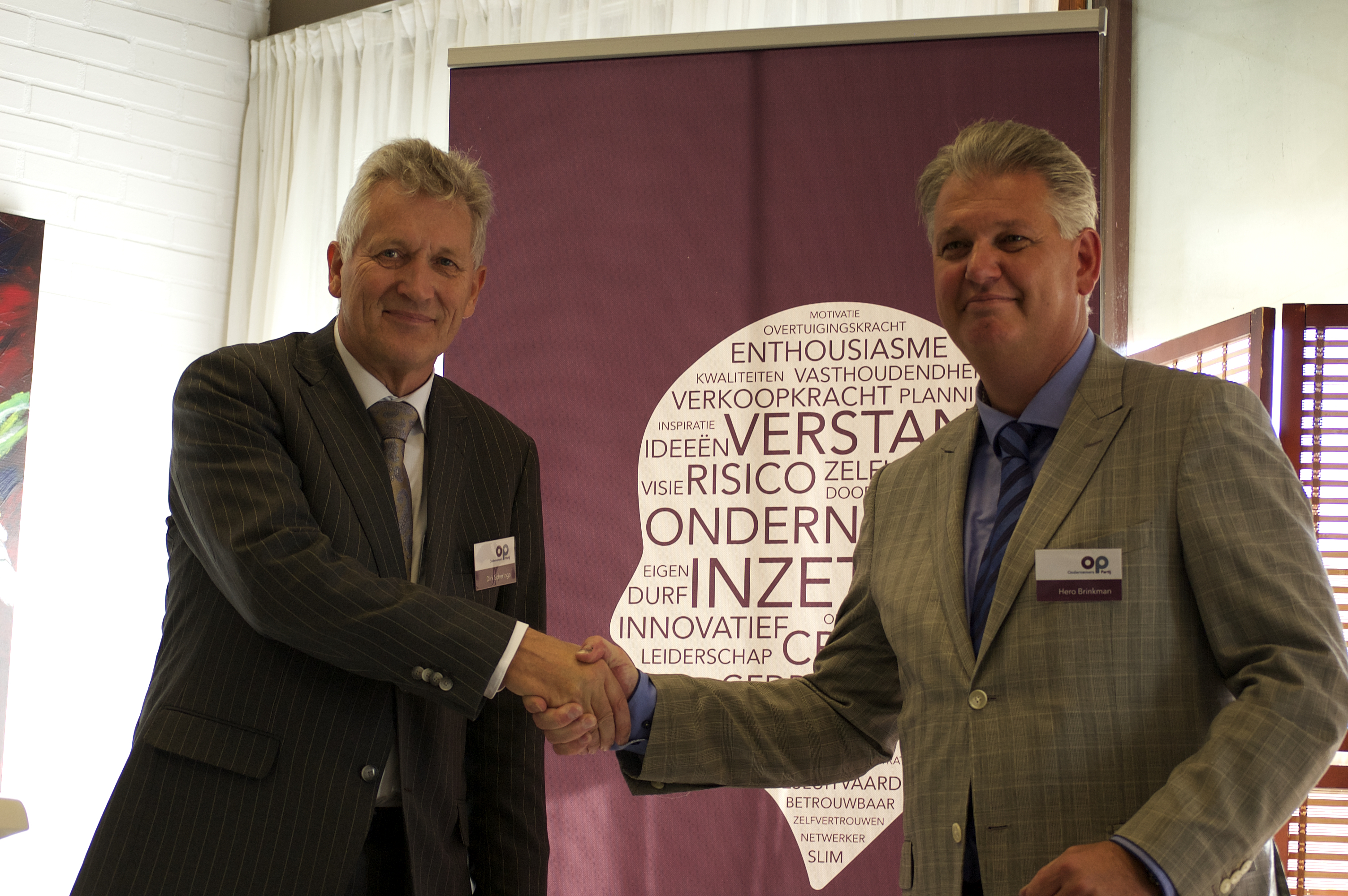 Dirk Scheringa en Hero Brinkman, foto gemaakt tijdens de bijeenkomst van de Ondernemers Partij (OP) in Krimpen aan den IJssel.